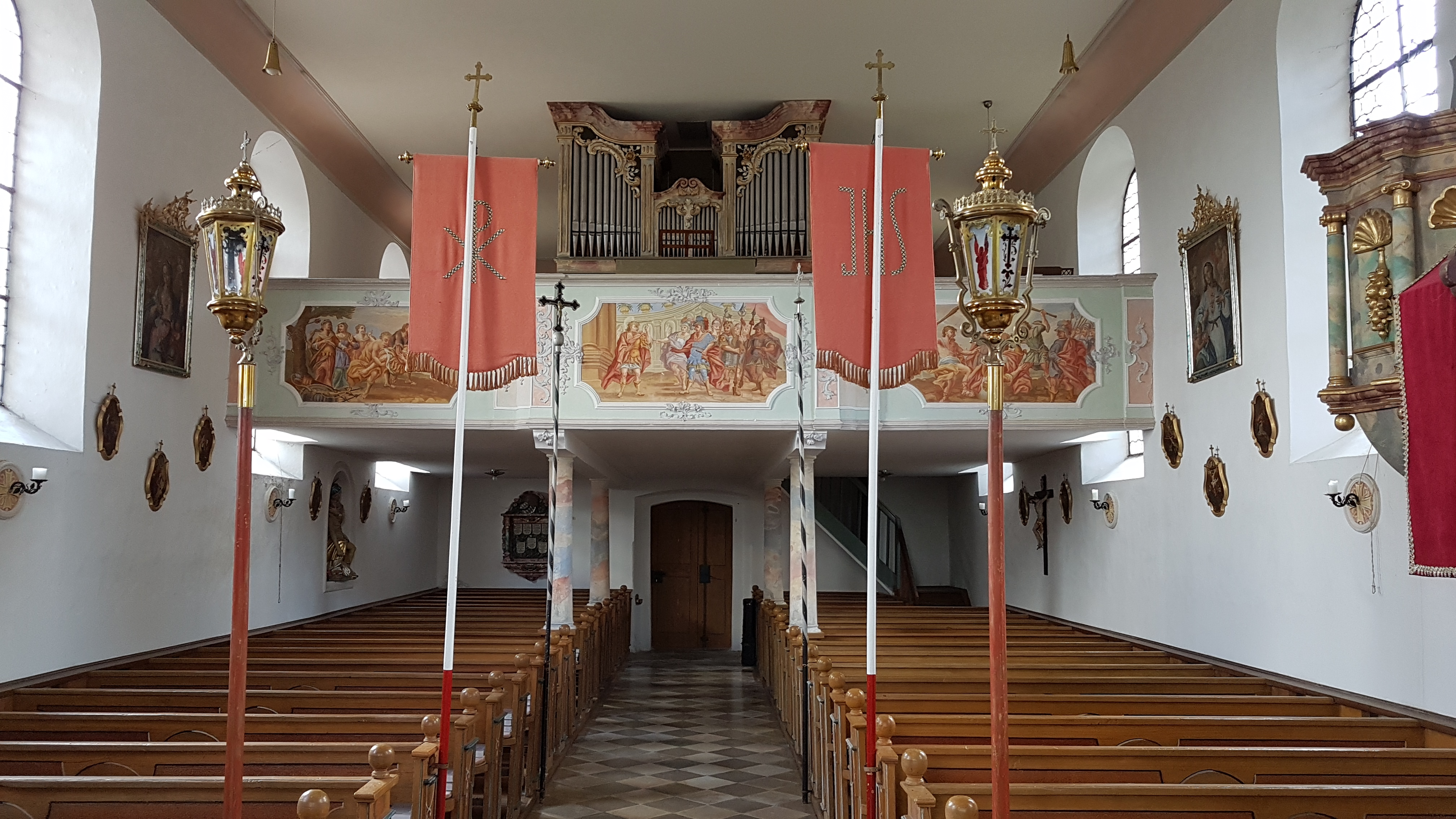 Burk (Marktoberdorf), Kirche St. Sebastian, Innenraum mit Blick zur Empore.